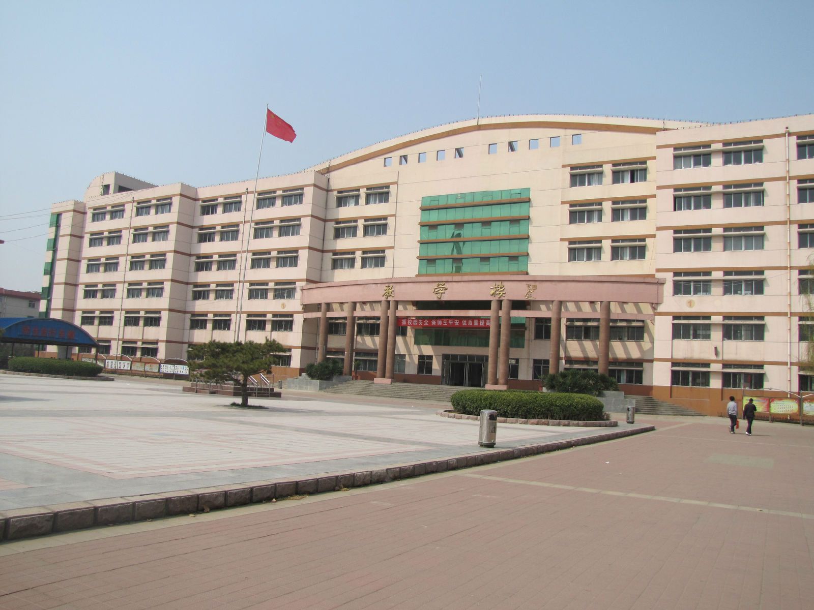 中文（中国大陆）: 肥城一中照片